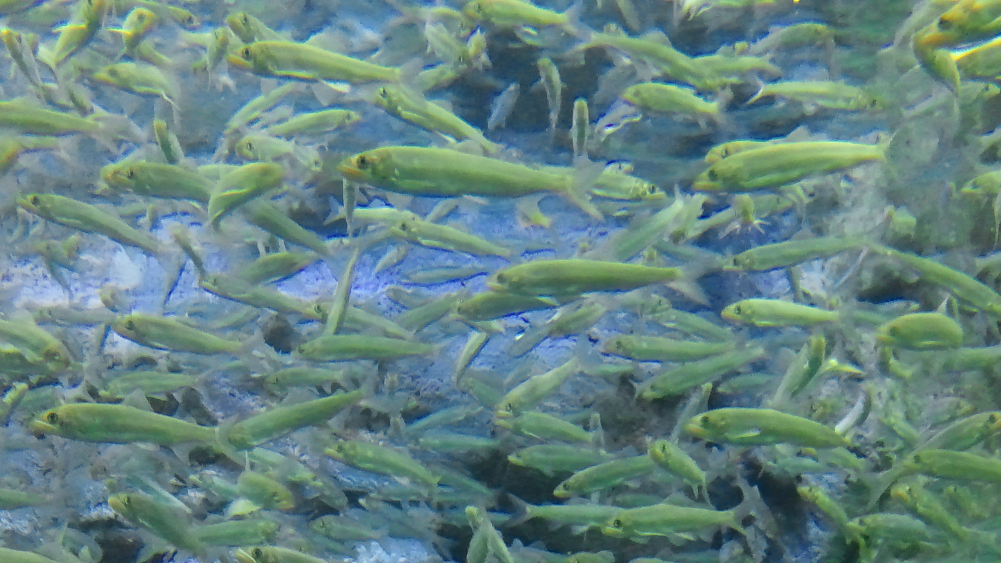 은어(Plecoglossus altivelis)